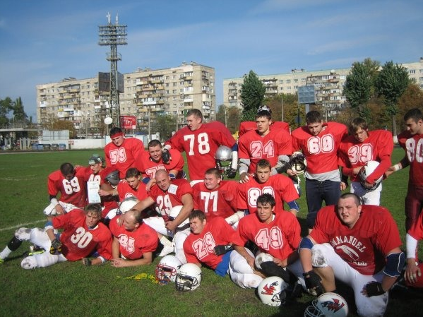 Перший матч нових Вовків